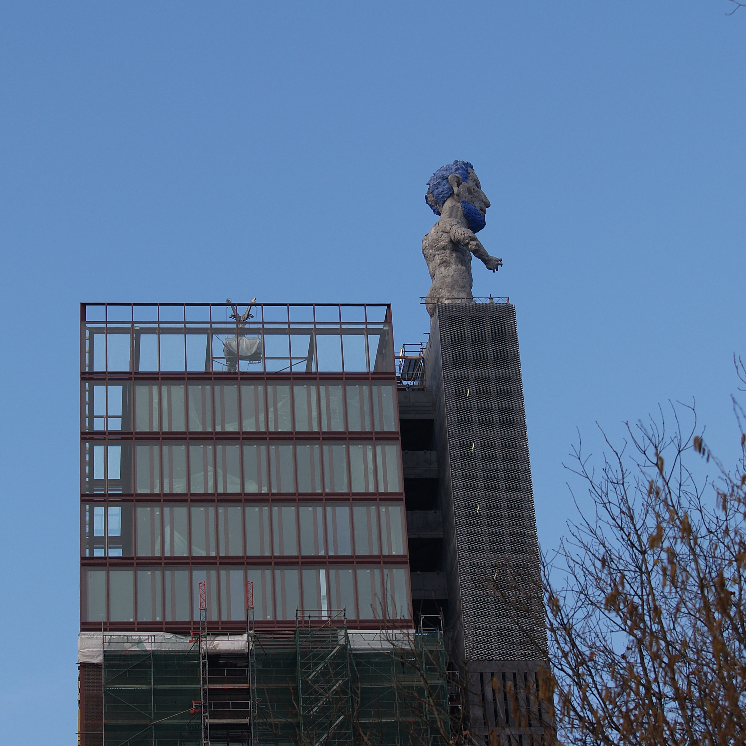 Zeche Nordstern, Gelsenkirchen, Förderturm von Schacht 2 mit Museumsaufbau und Herkules von Markus Lüpertz